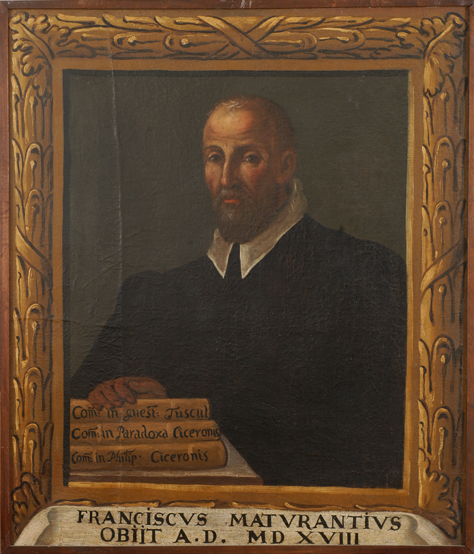 Ritratto di Francesco Maturanzio. Olio su Tela, cm 81,5x95, cornice cm 85x98. Descrizione: ritratto a mezzo busto di Francesco Maturanzio, raffigurato di tre quarti. Tiene la mano sopra tre tomi appoggiati su un tavolo. Il ritratto è inserito in una cornice dipinta a fogliami. L'opera fa parte dei 60 ritratti degli uomini illustri perugini dipinti dallo Scacioppa per la Biblioteca comunale Augusta